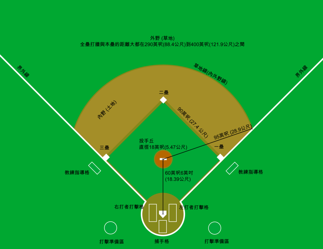 約按比例繪製的棒球場地 Bân-lâm-gú: Iok àn pí-lē huē-tsè ê pāng-kiû tiûnn-tē. 約按比例繪製的棒球場地